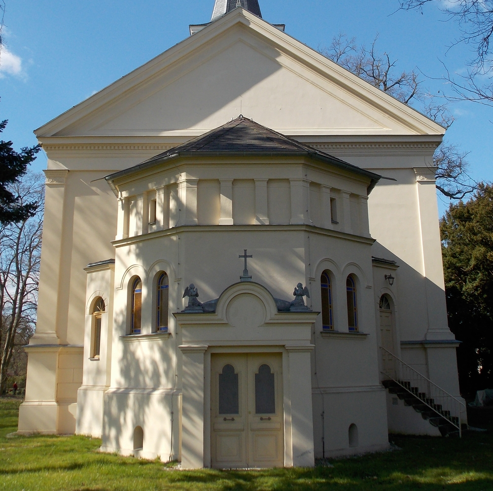 Gruftanbau Gutskirche Melkof